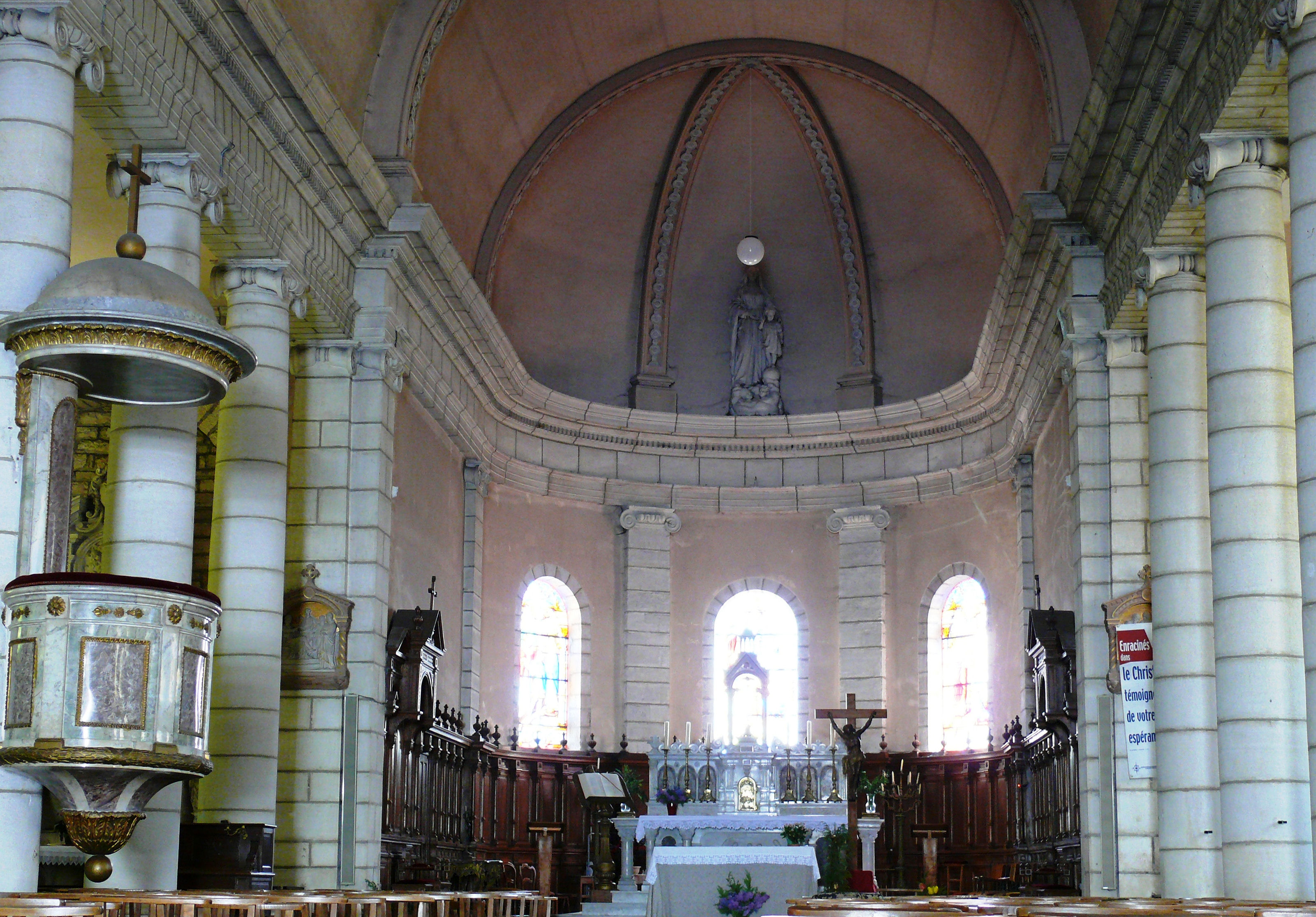 Champlitte - Eglise Saint-Christophe - Nef